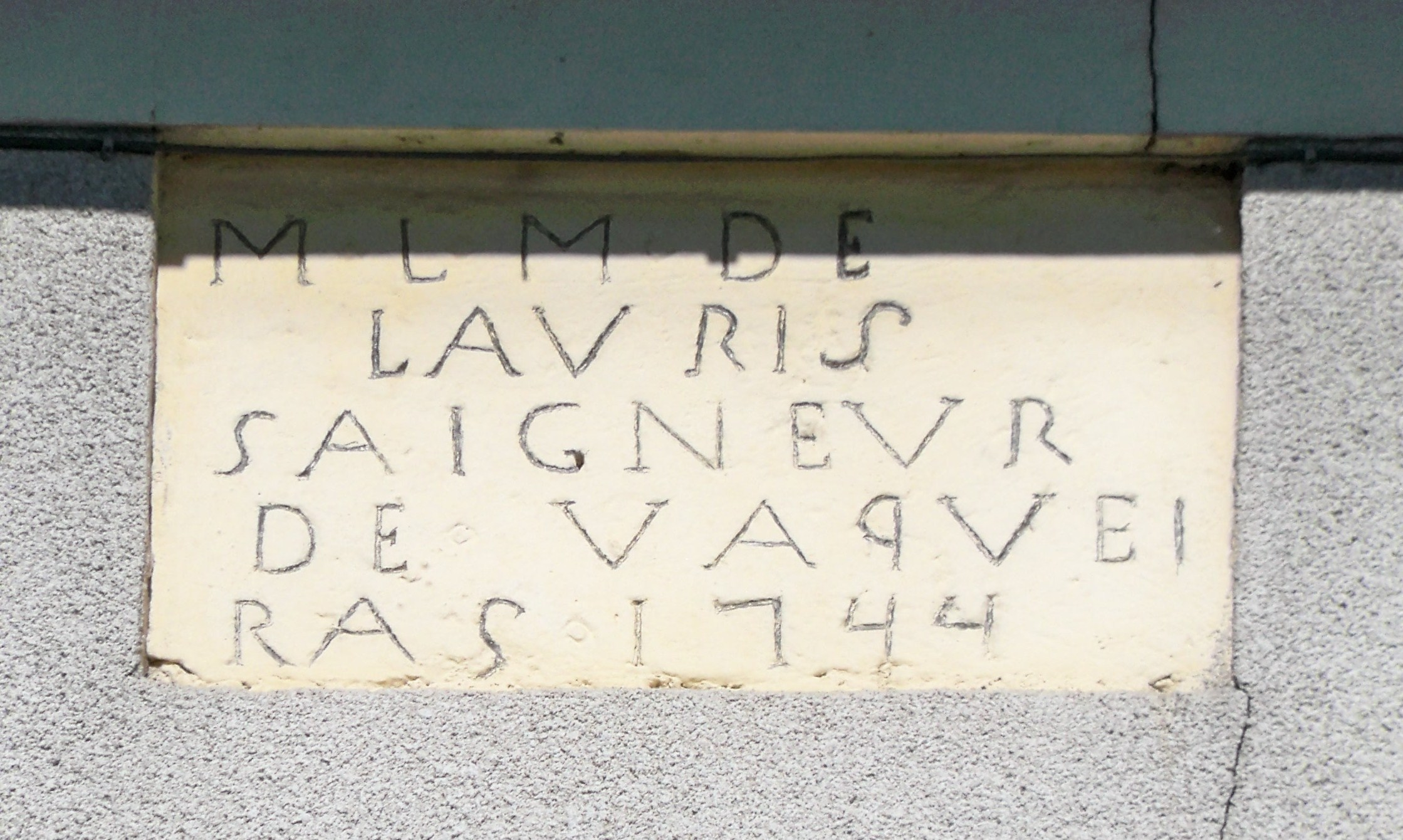 Plaque Comte de Lauris de Vacqueyras, Vaucluse, France